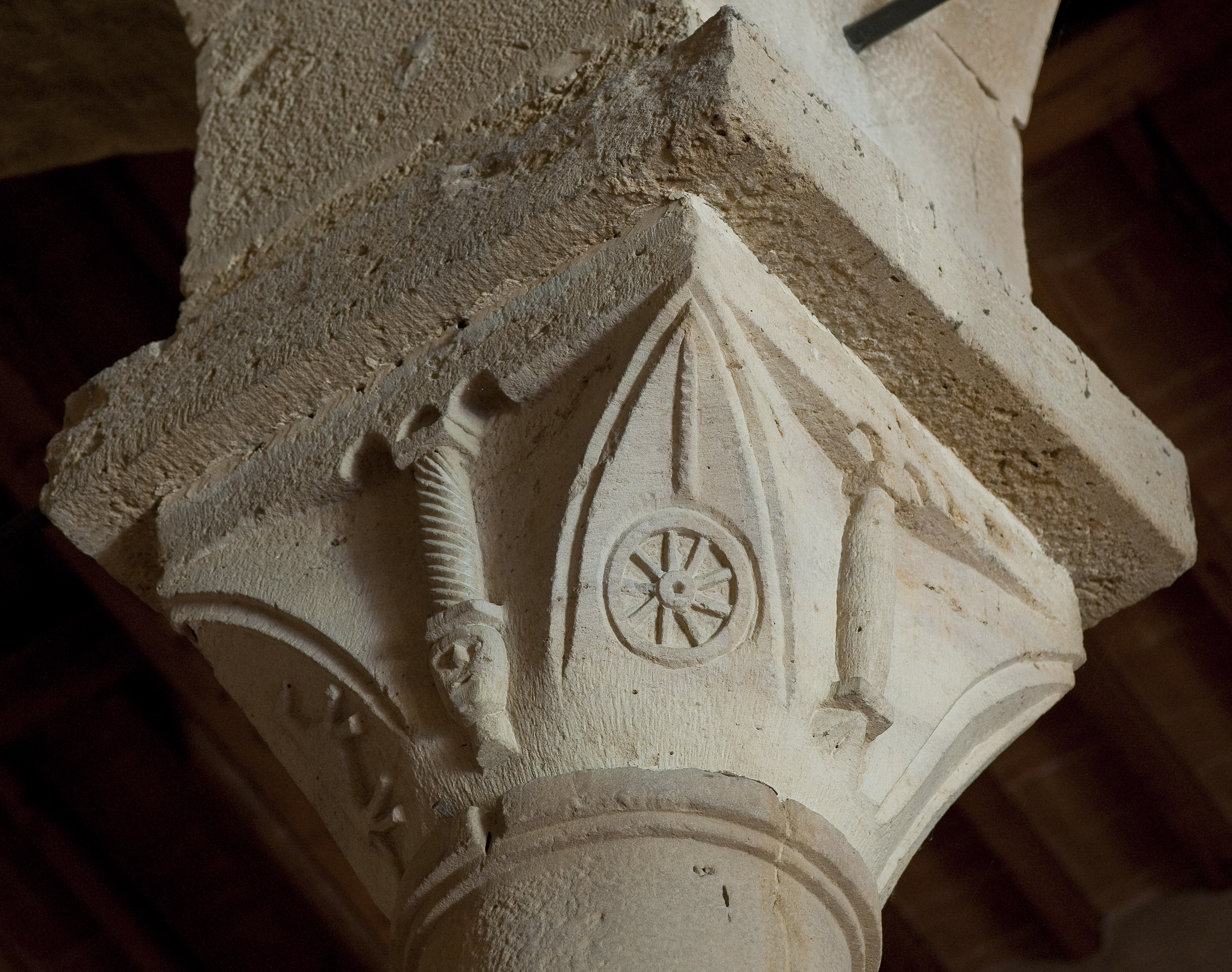 Capitello nella Pieve di Santa Maria Assunta a Chianni, Gambassi Terme